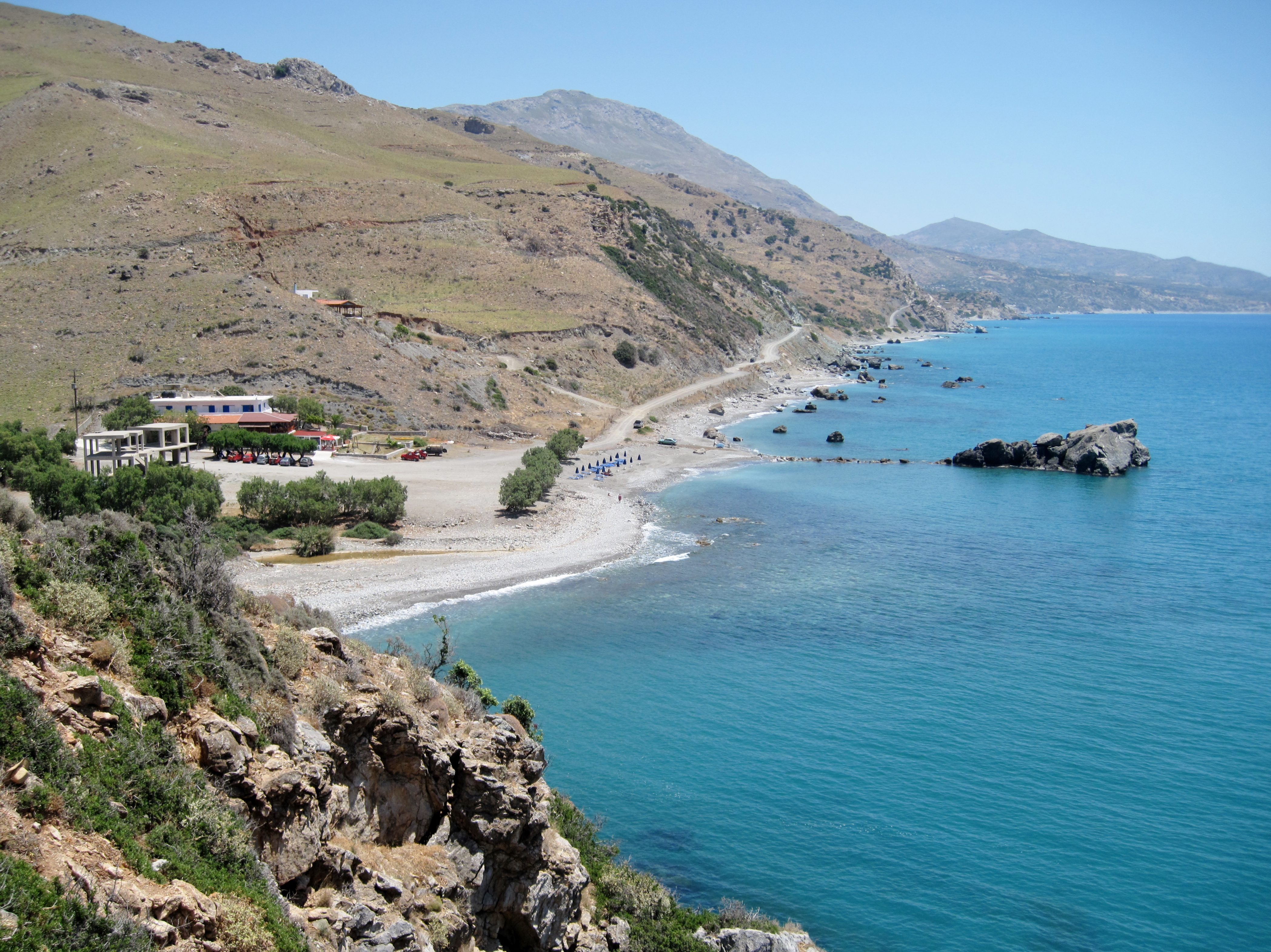 Drymiskiano Ammoudi („Sandstrand von Drymiskos“), Gemeinde Finikas, Präfektur Rethymno, Kreta, Griechenland